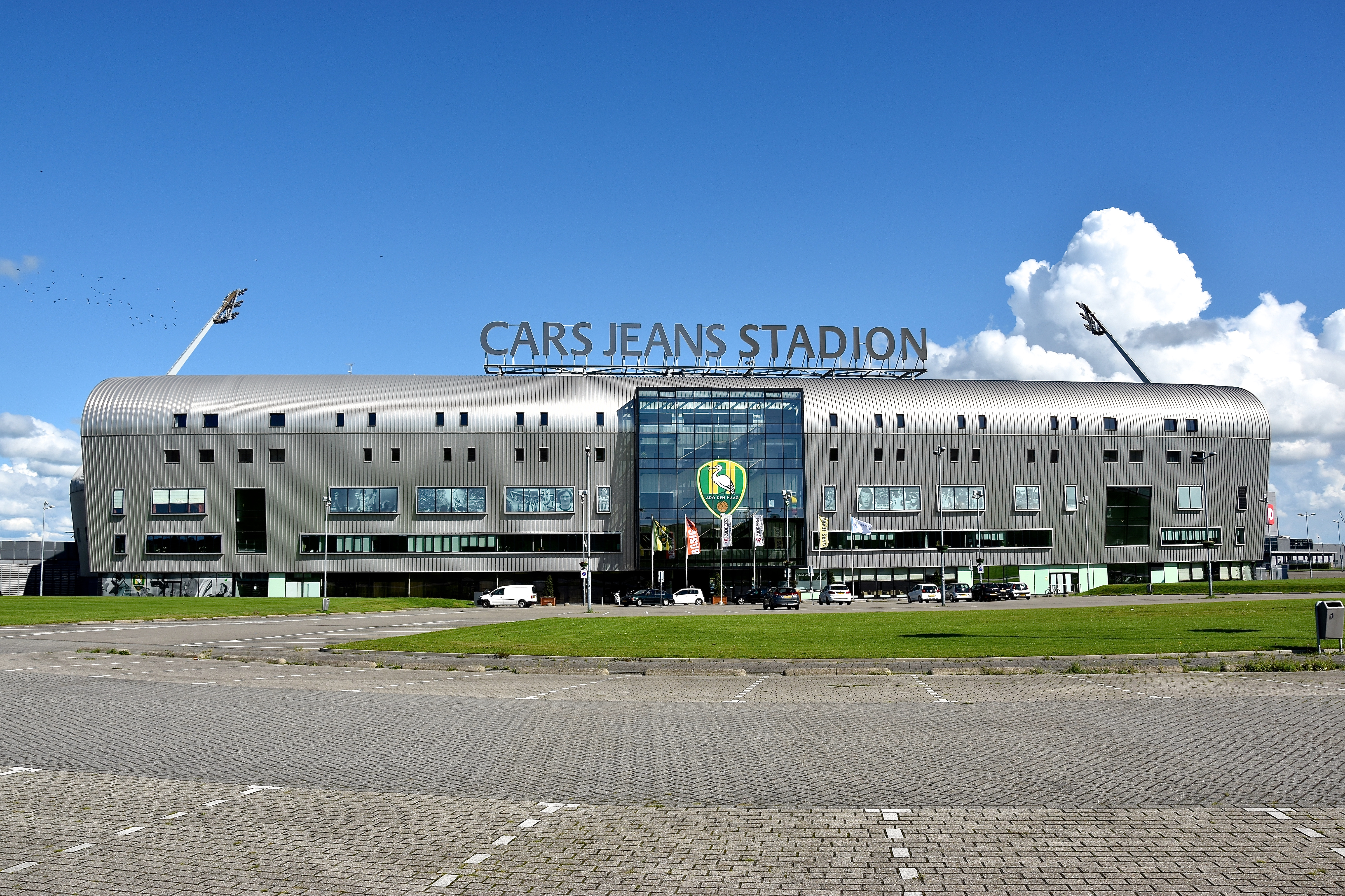 Afgelopen week is de naam van de nieuwe hoofdsponsor op het stadion geplaatst.